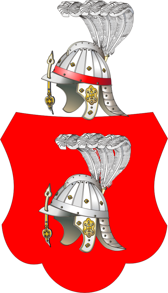 Bieliński, polish CoA